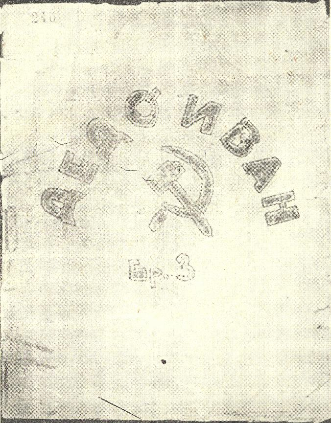 Брой 3 на комунистическия кумановски вестник Дедо Иван